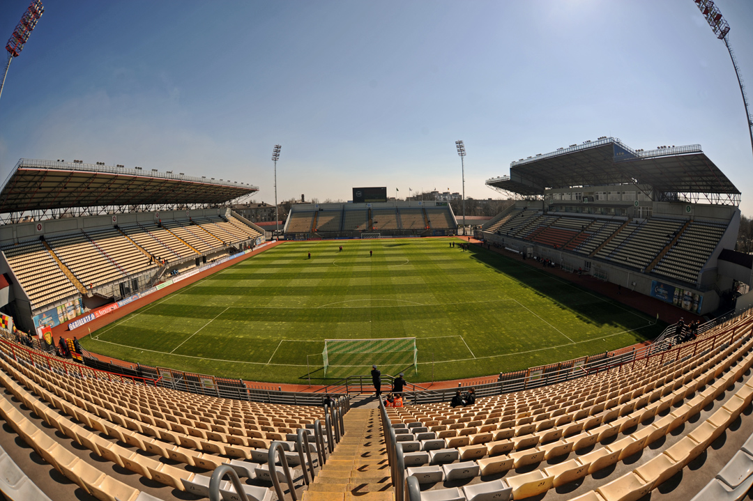 Slavutich Arena